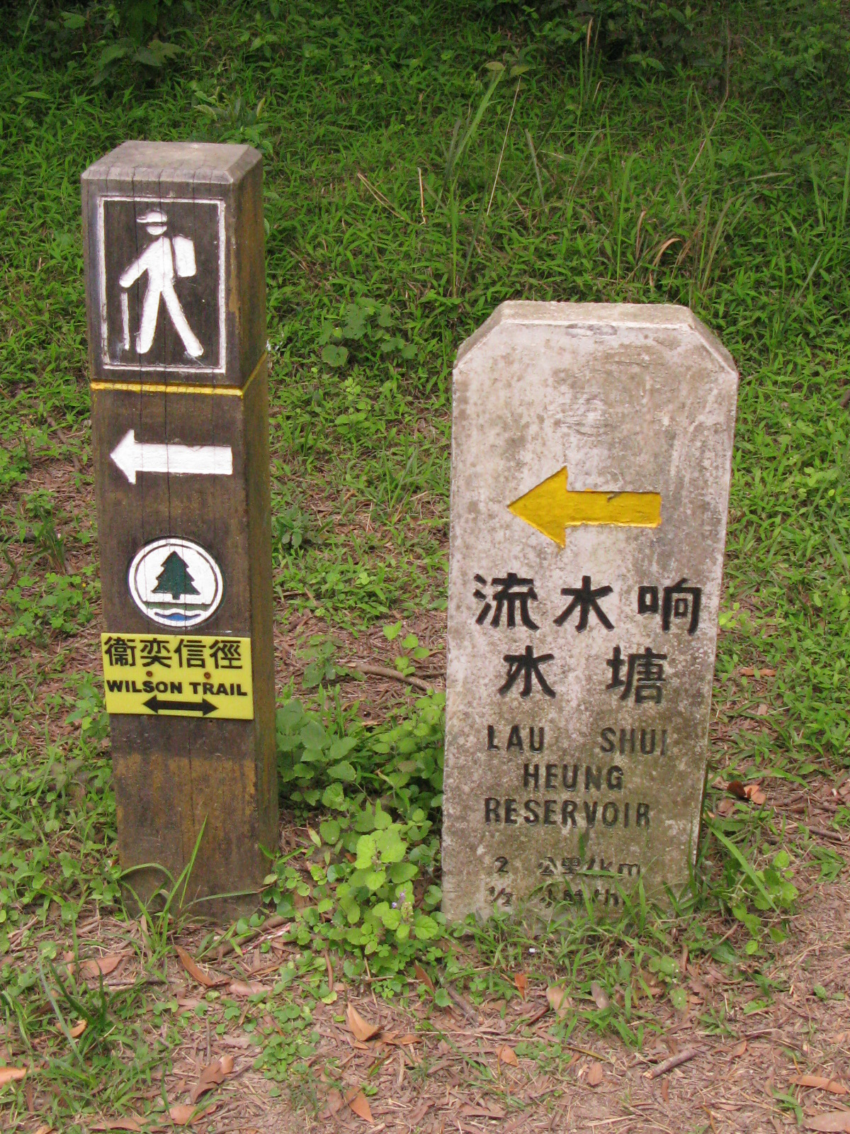 中文（香港）: 香港衛奕信徑第九段路標，旁為往流水響水塘路標